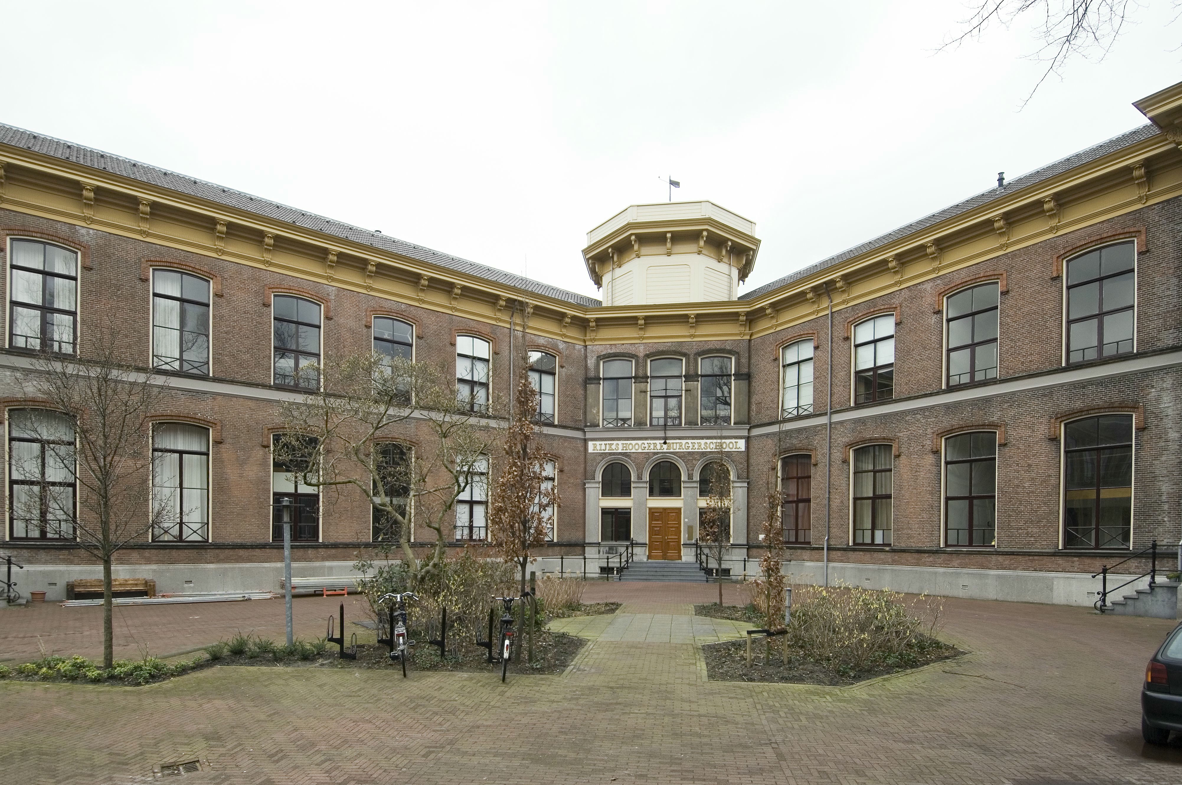 voormalig Rijks HBS: voormalig Rijks HBS